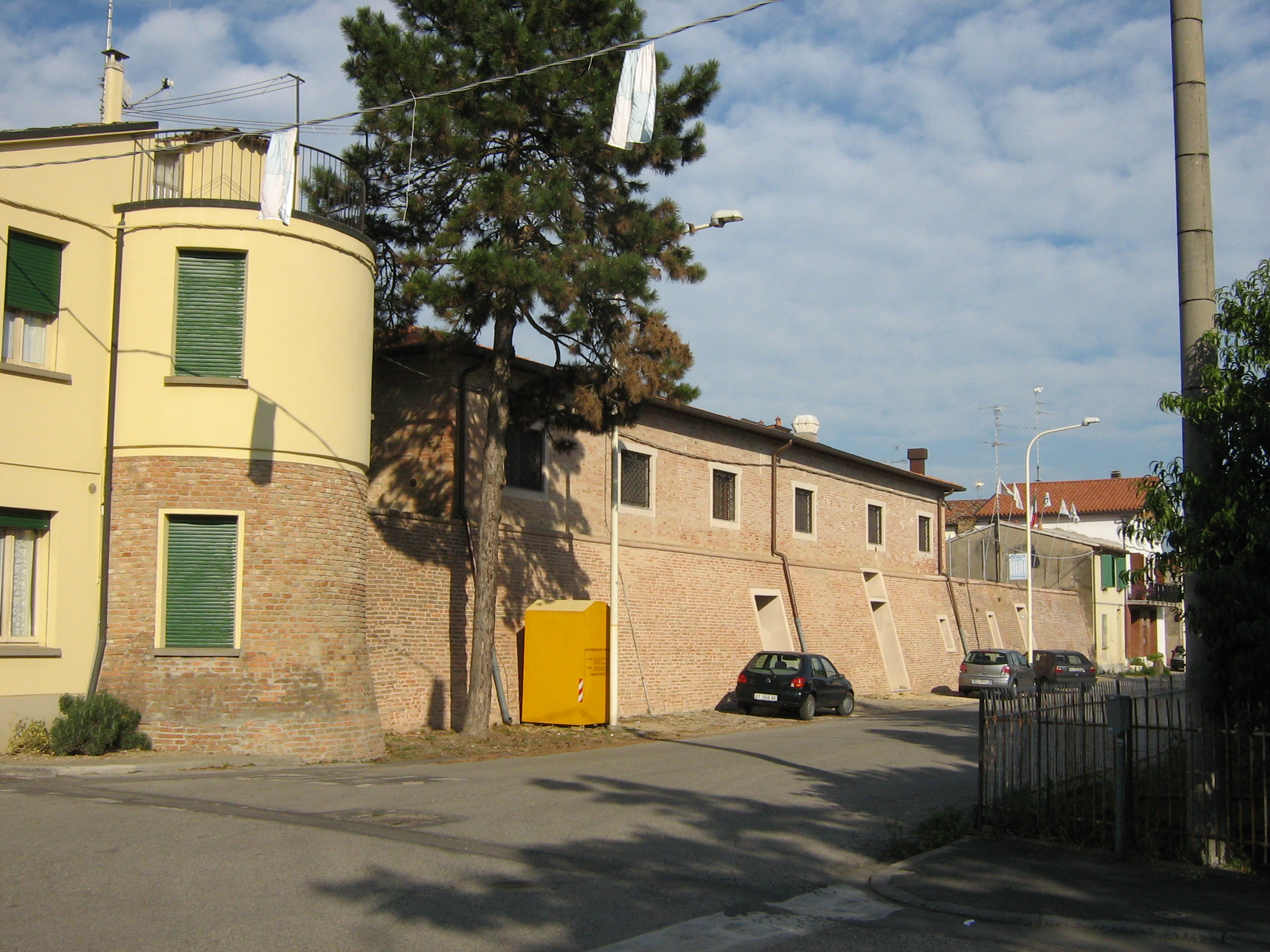 Tratto esistente delle mura perimetrali del "Castrum Granaroli" a Granarolo Faentino